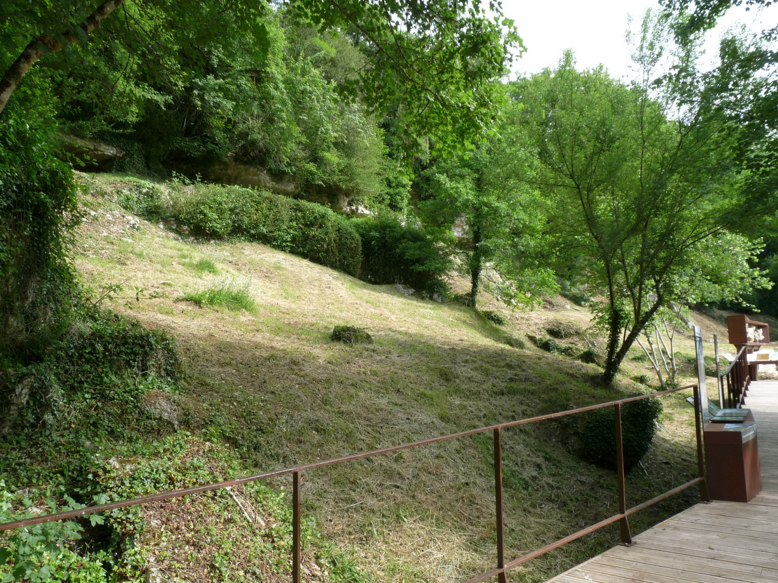 Roc de Sers, Charente, France